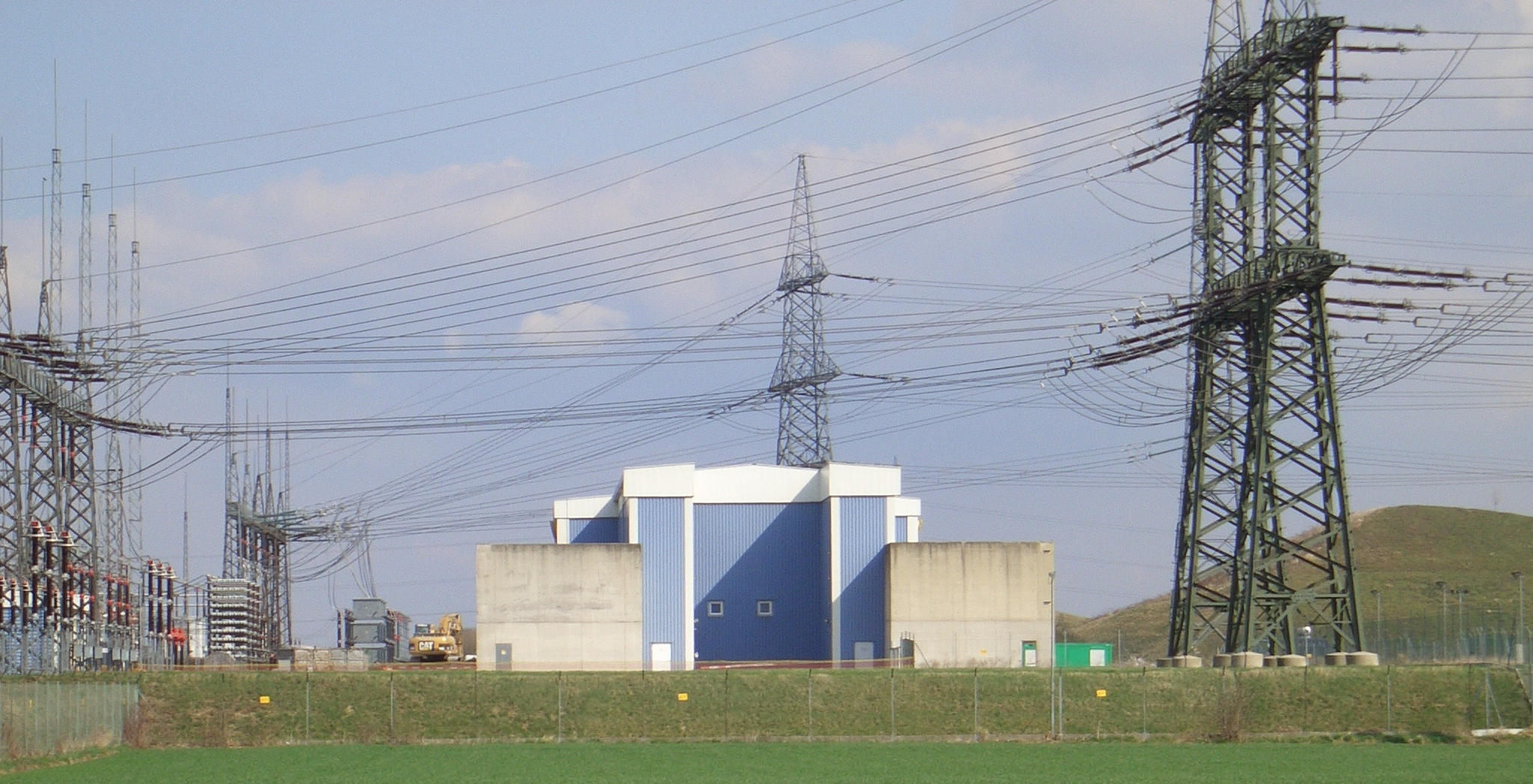 Umspannwerk Wien-Südost, Ehemalige GKK Konverterhalle, vom Westen aufgenommen. Der Mast im Hintergrund ist der erste Mast der 380 kV-Leitung zum Umspannwerk Sixtneusidl. Hinter dem Portalmast befindet sich der erste Mast der 380kV-Leitung nach Györ. Der Mast im Vordergrund ist der erste Mast der Leitungen nach Grosspetersdorf bzw. Hessenau, die nördlich von Ebreichsdorf verzweigt.